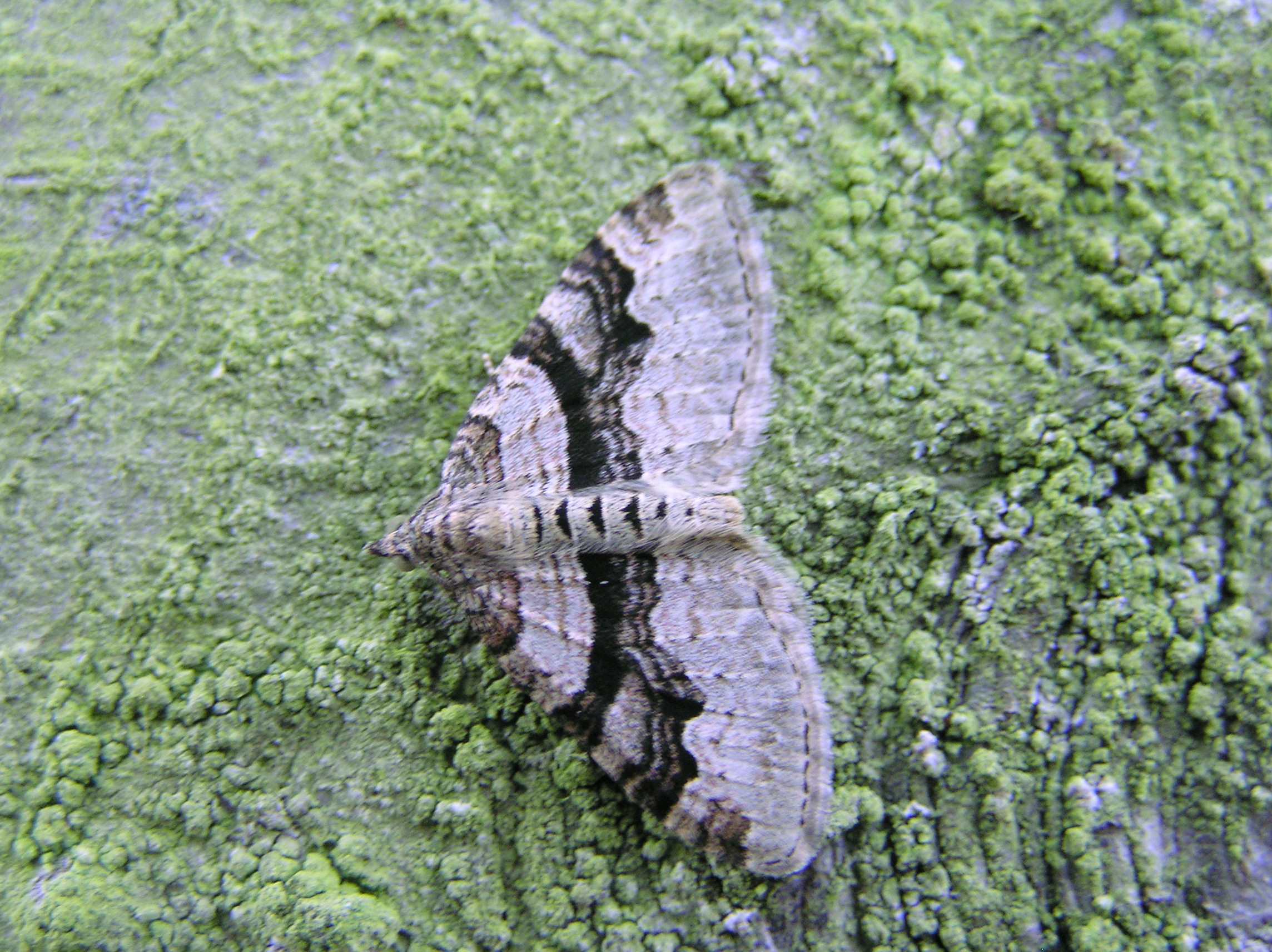 Xanthorhoe designata